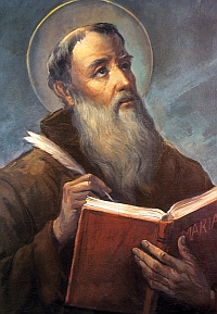 Un dipinto raffigurarante San Lorenzo da Brindisi